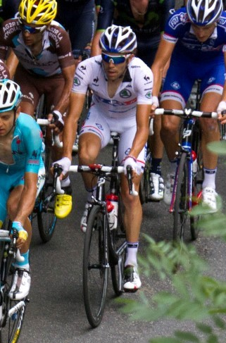 227 groep gele trui